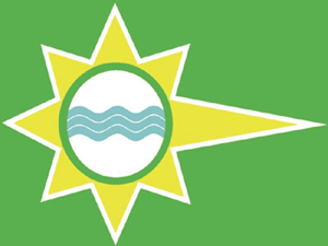 Bandeira da cidade de Potirendaba, SP